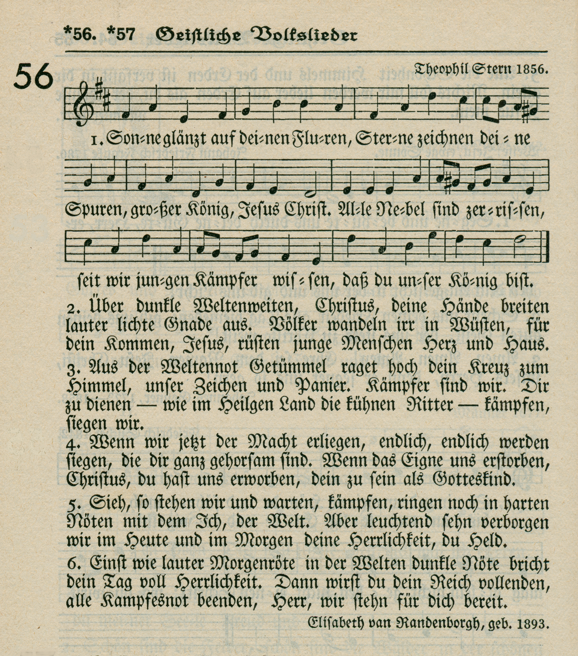 Elisabet van Randenborgh. Kirchenlied "Sonne glänzt auf deinen Fluren" im Evangelischen Gesangbuch für Rheinland und Westfalen (ca. 1960)